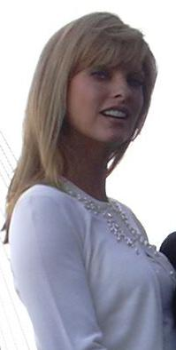 Linda EvangelistaLinda Evangelista and I